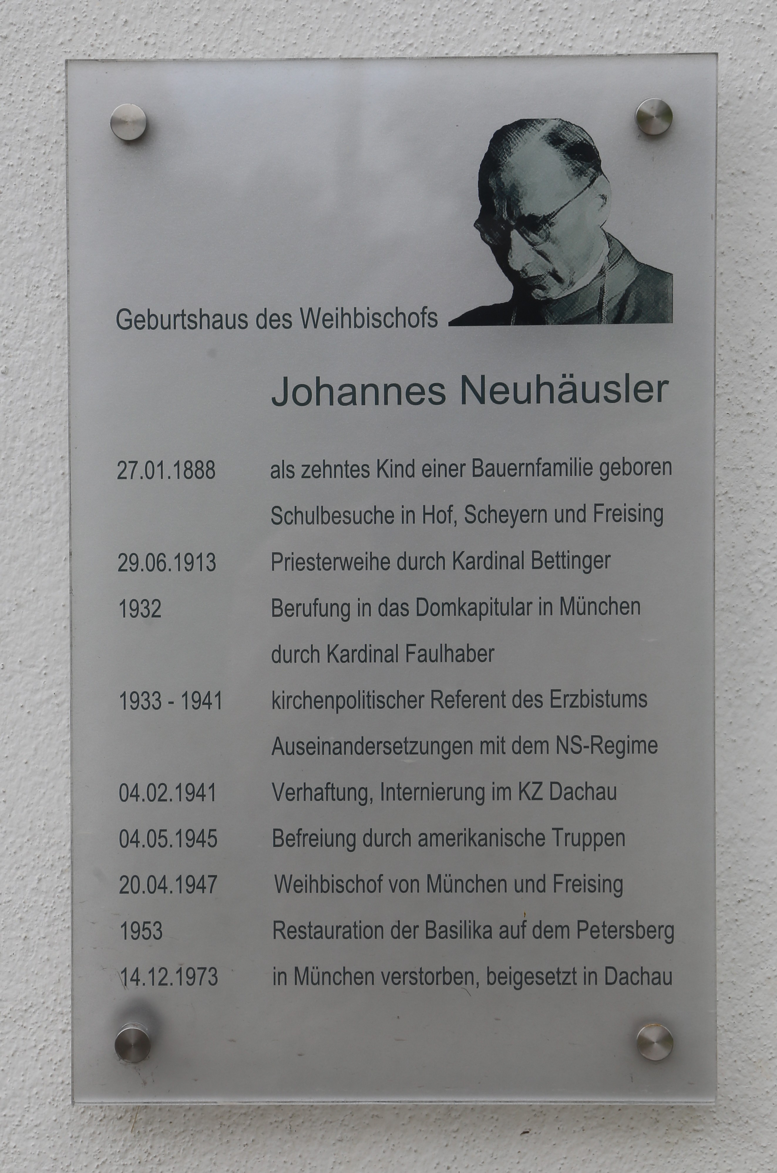 Bischof-Neuhäusler-Straße 50, Eisenhofen, Erdweg; Bauernhaus, zweigeschossiger Satteldachbau mit Lisenen- und Gesimsgliederung, im Kern 18. Jahrhundert, 1873 ausgebaut; Geburtshaus des Münchner Weihbischofs Johannes Neuhäusler